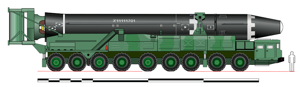 Un misil norcoreano Hwasong-15 en su vehiculo de transporte